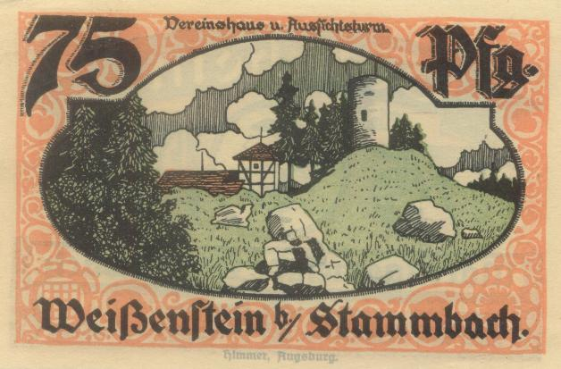 Serie Notgeld von Stammbach